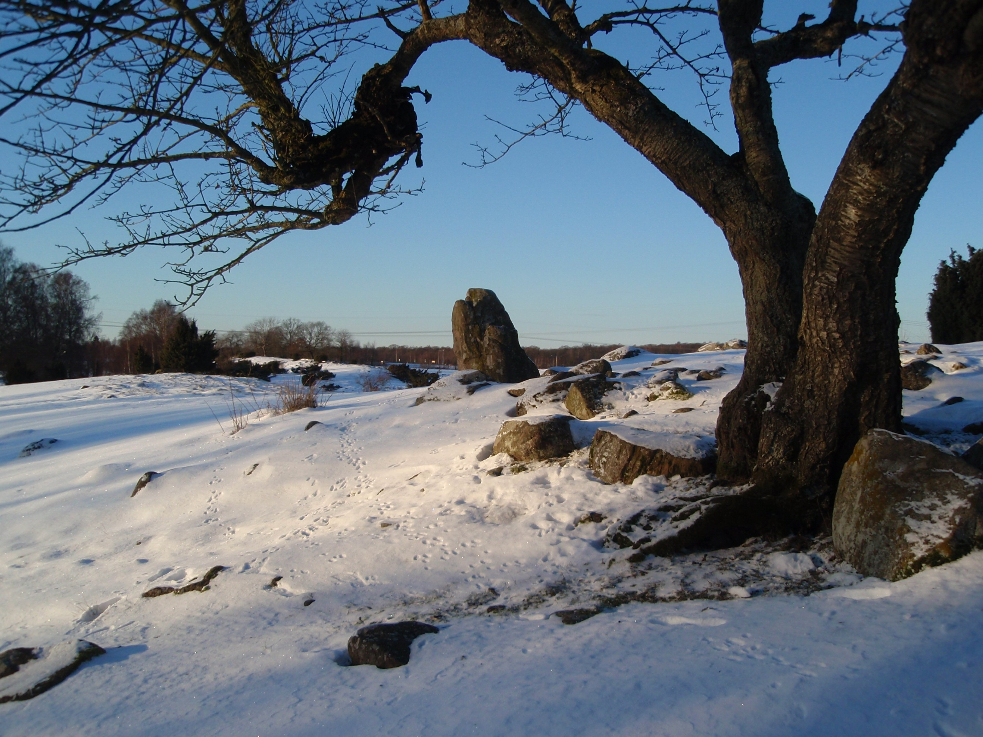 Hörby fälad stensättning och träd